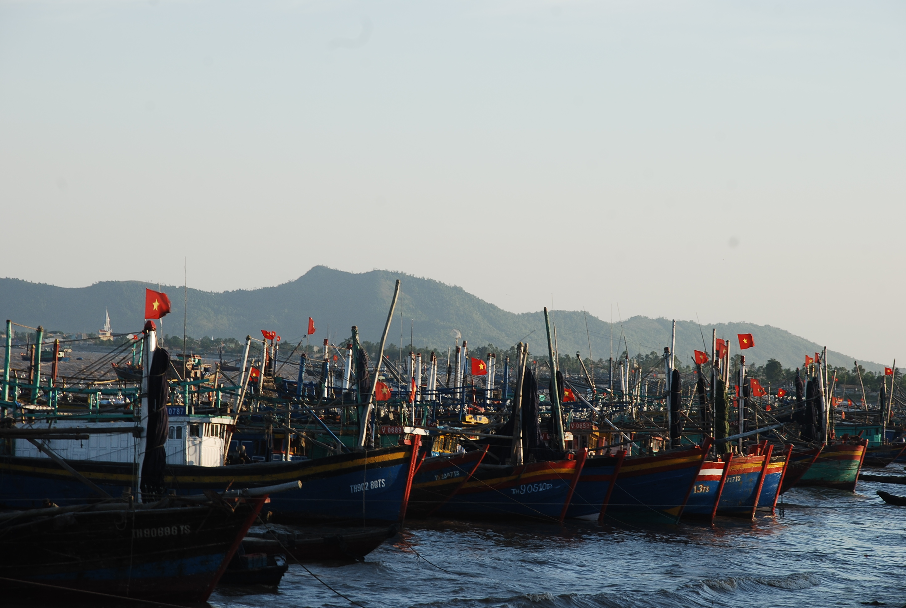 Bờ biển Diêm phố - Ngư lộc - Hậu lộc - Thanh Hoá